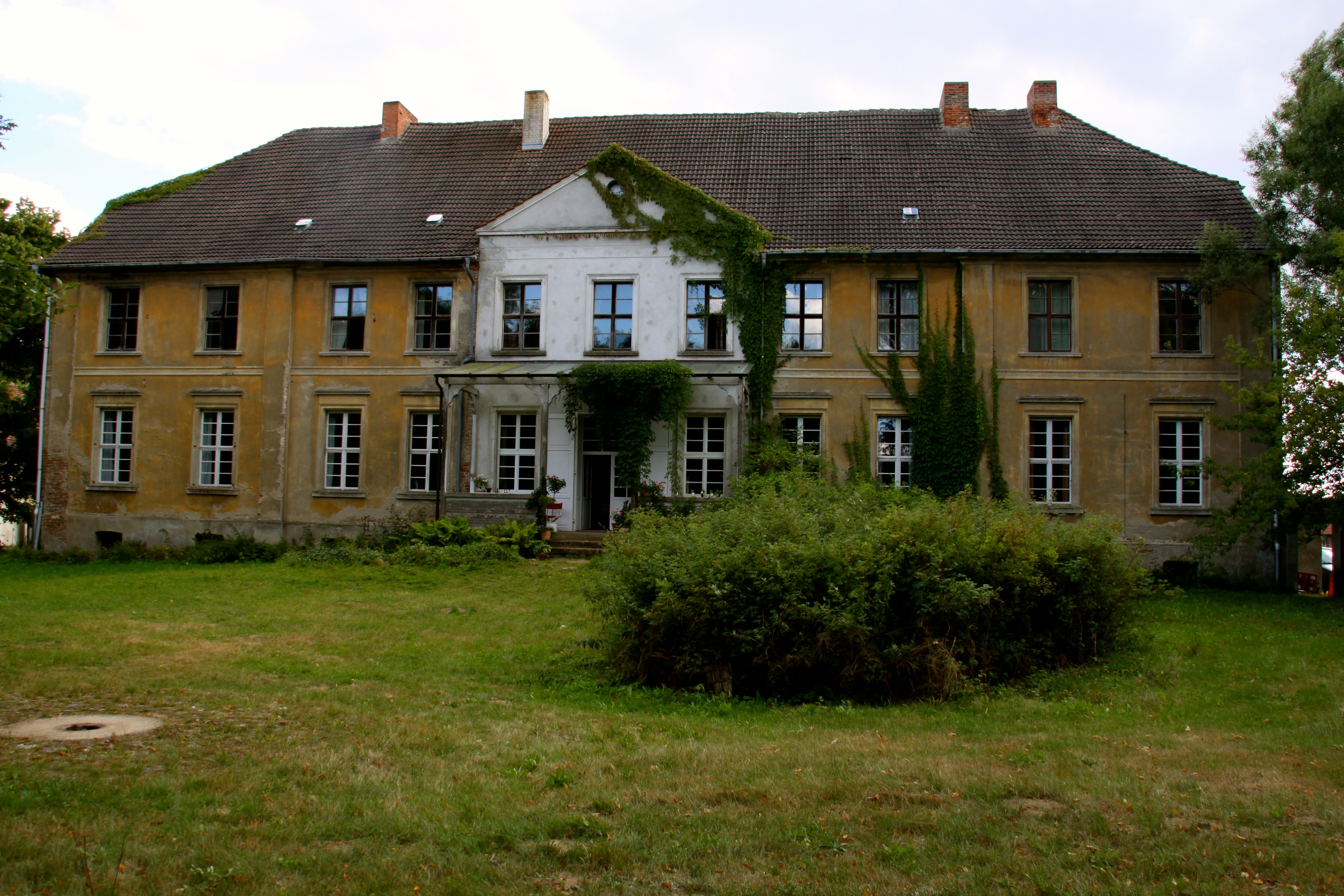 Herrenhaus Tornow Frontseite